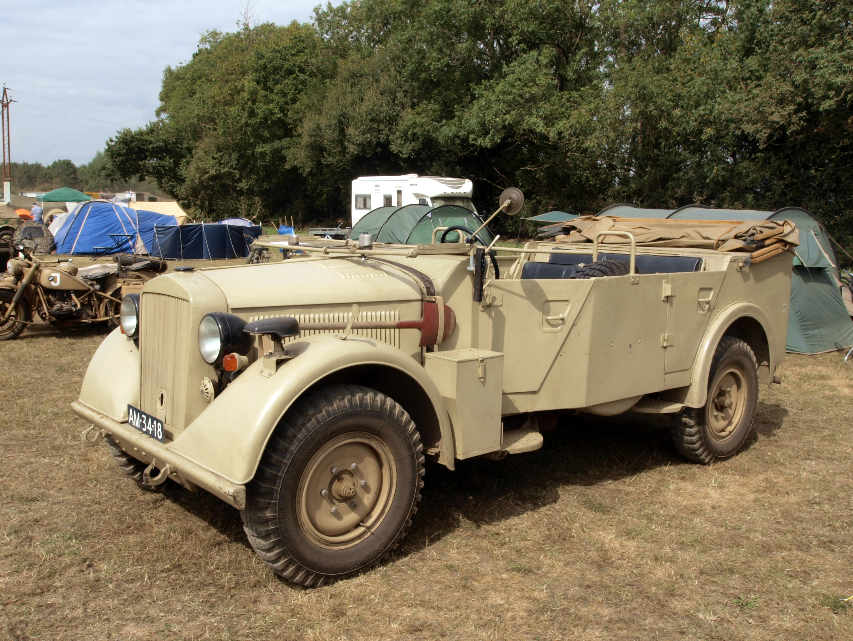 Horch (1941)